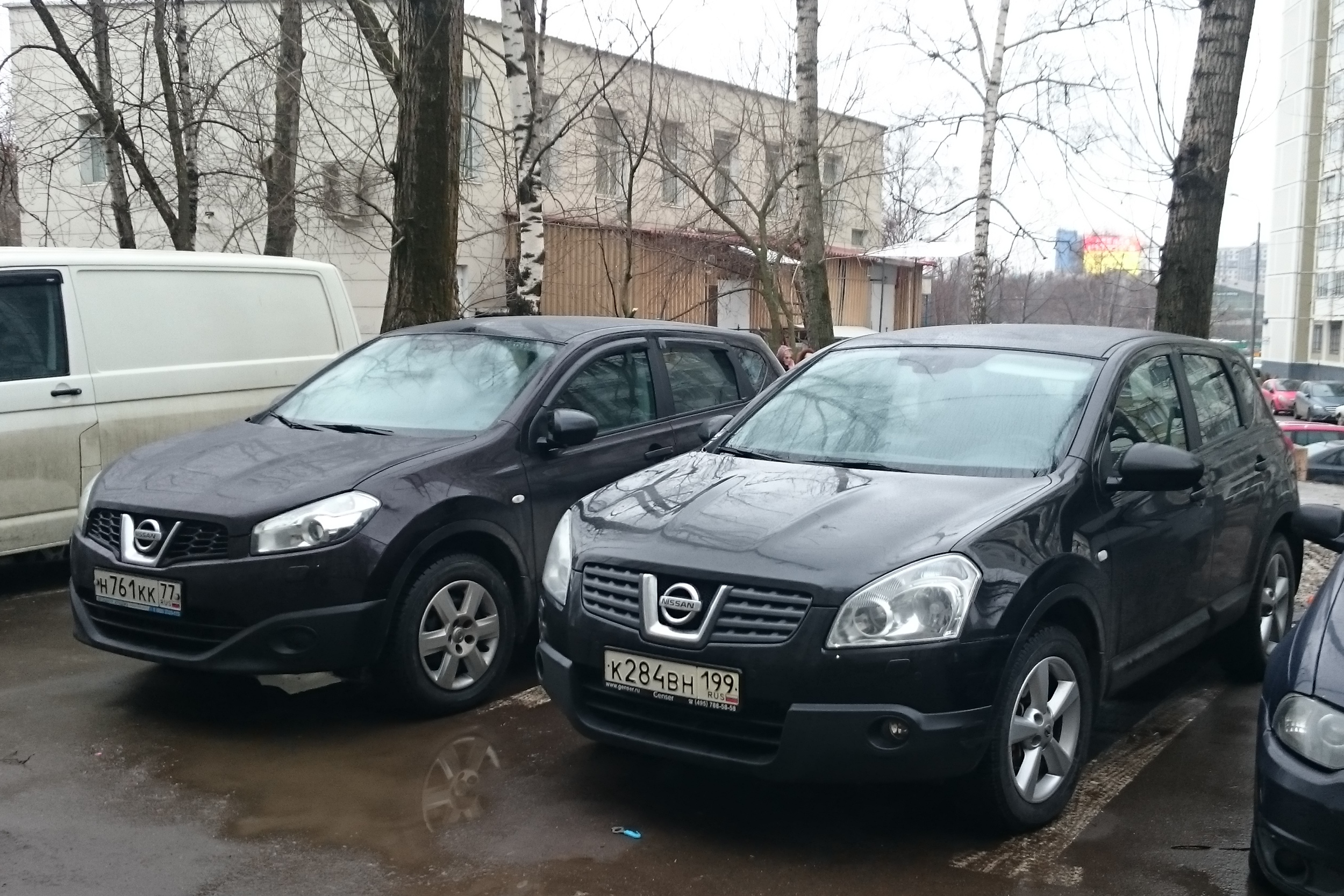 Ниссан Кашкай до и после рестайлинга